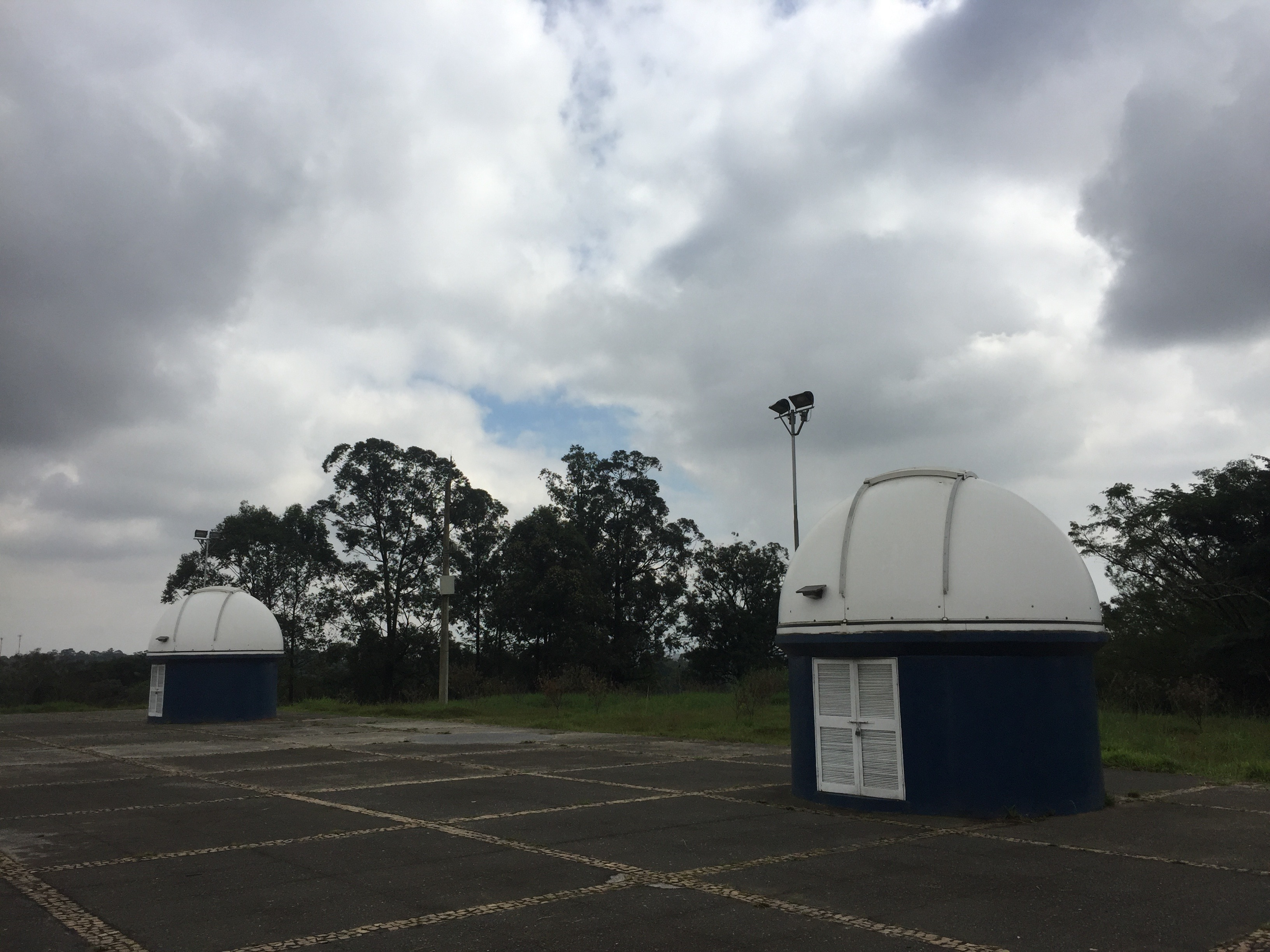 Aparelhos (telescópios) usados no Planetário do Carmo localizados na parte externa traseira.